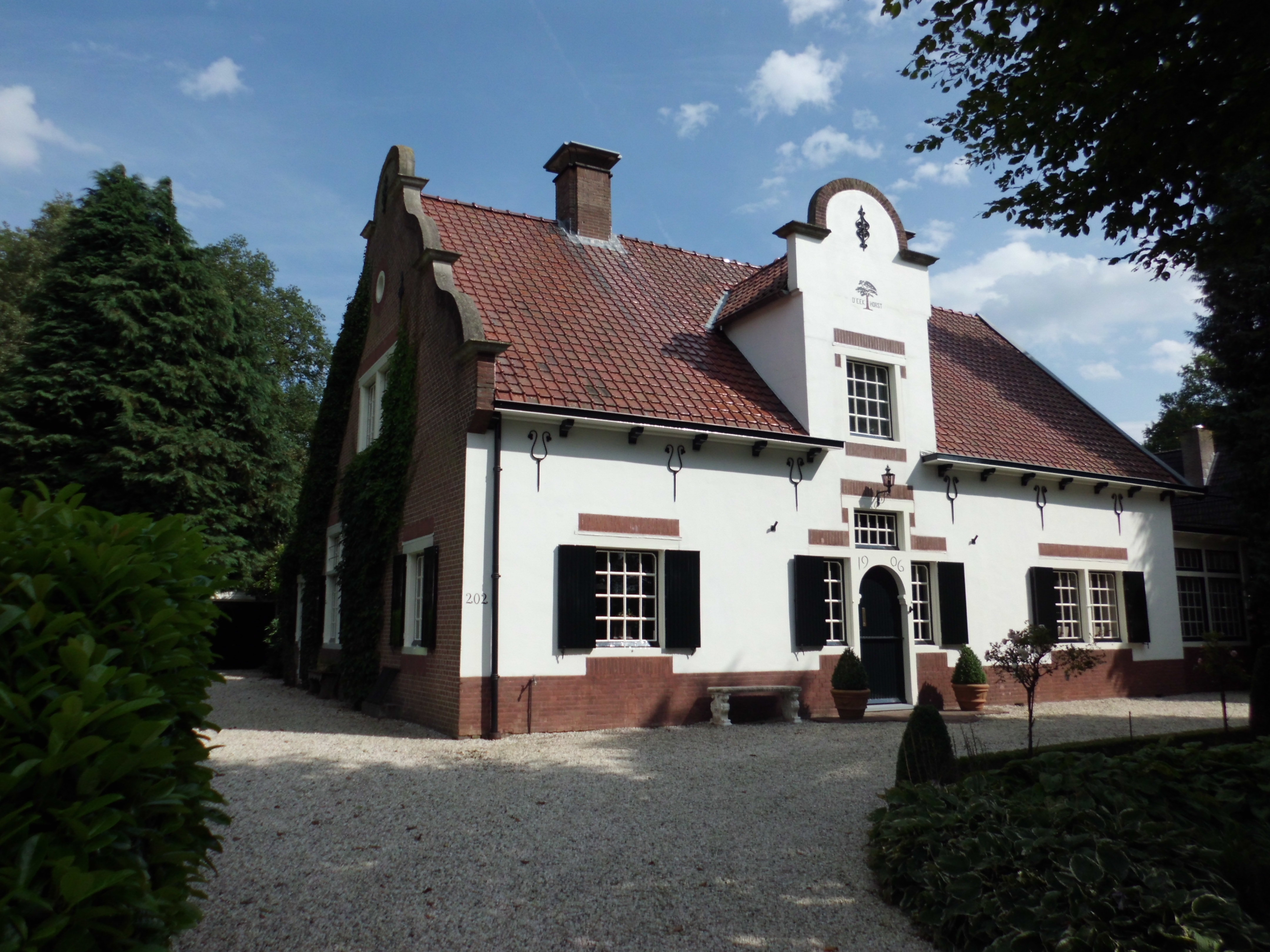 D' Eekhorst, Dorpsstraat 202 Lunteren